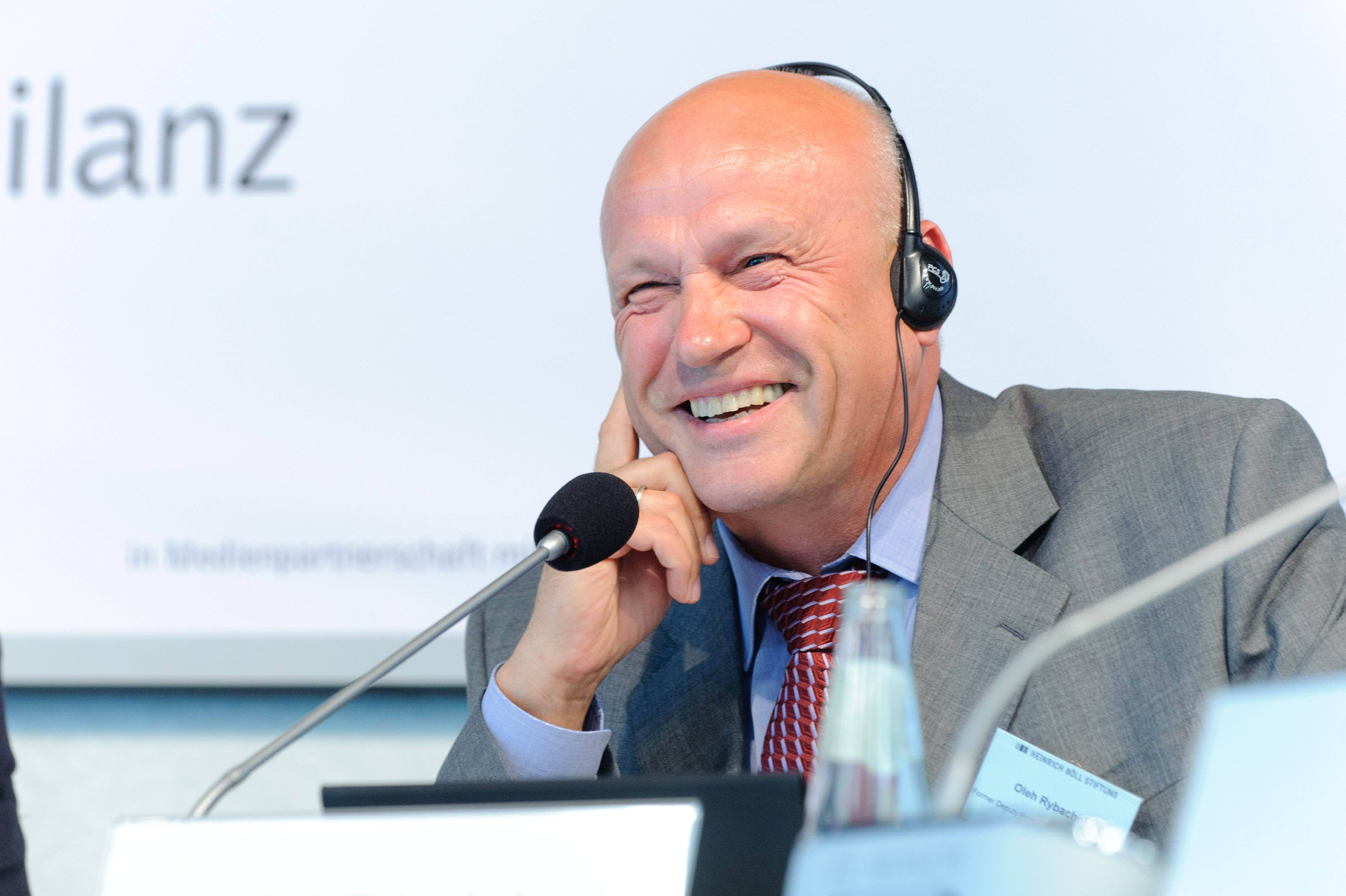 Oleh Rybachuk (ehem. Vize-Premierminister der Ukraine, Kiew)